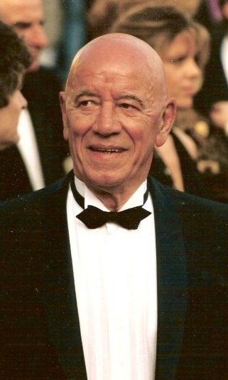 André Pousse, acteur français, au festival de Cannes